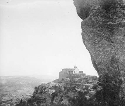 Imatge